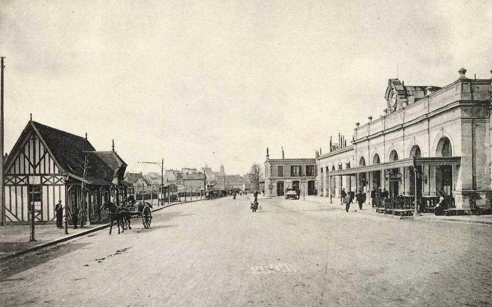 place de la gare à Caen – À droite, la gare de la Compagnie des chemins de fer de l'Ouest ; à gauche, la gare des Chemins de fer du Calvados.